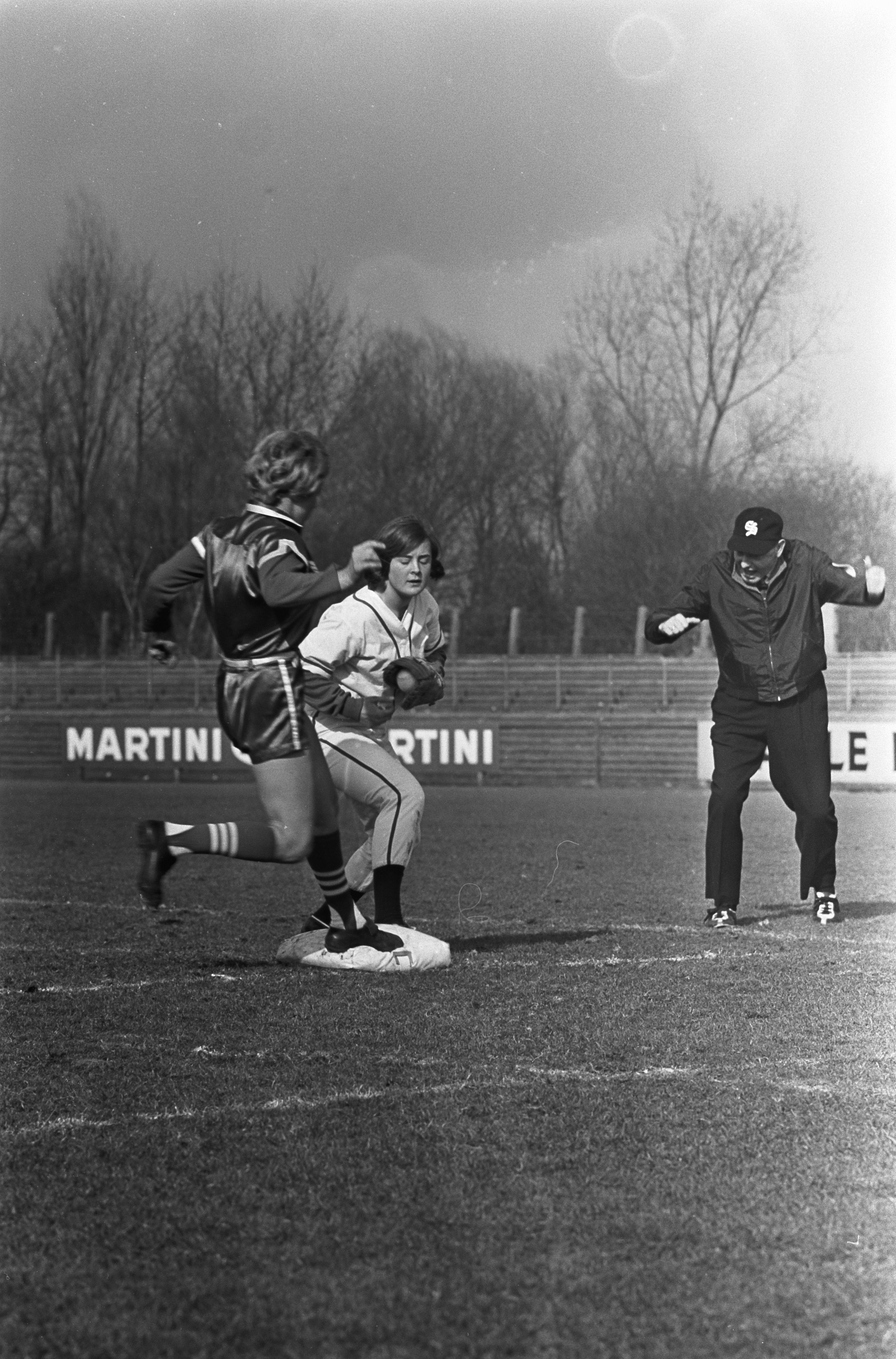 Collectie / Archief : Fotocollectie Anefo Reportage / Serie : [ onbekend ] Beschrijving : Dames softbal Nederland tegen de Raybostos Brakketts (Amerikaanse dames), de Nederlandse Ludi Handgraaf zorgt dat het eim van de Amerikaanse uit is / Datum : 14 maart 1965 Trefwoorden : softbal Instellingsnaam : Raybostos Brakketts Fotograaf : Kroon, Ron / Anefo Auteursrechthebbende : Nationaal Archief Materiaalsoort : Negatief (zwart/wit) Nummer archiefinventaris : bekijk toegang 2.24.01.05 Bestanddeelnummer : 917-5382